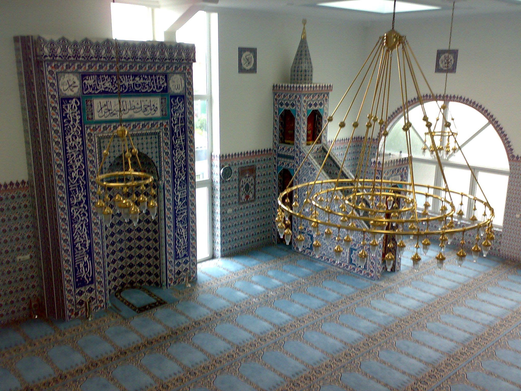 Aufnahme von der Frauenempore